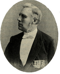 Haakon Tveter, politiker og gårdbruker